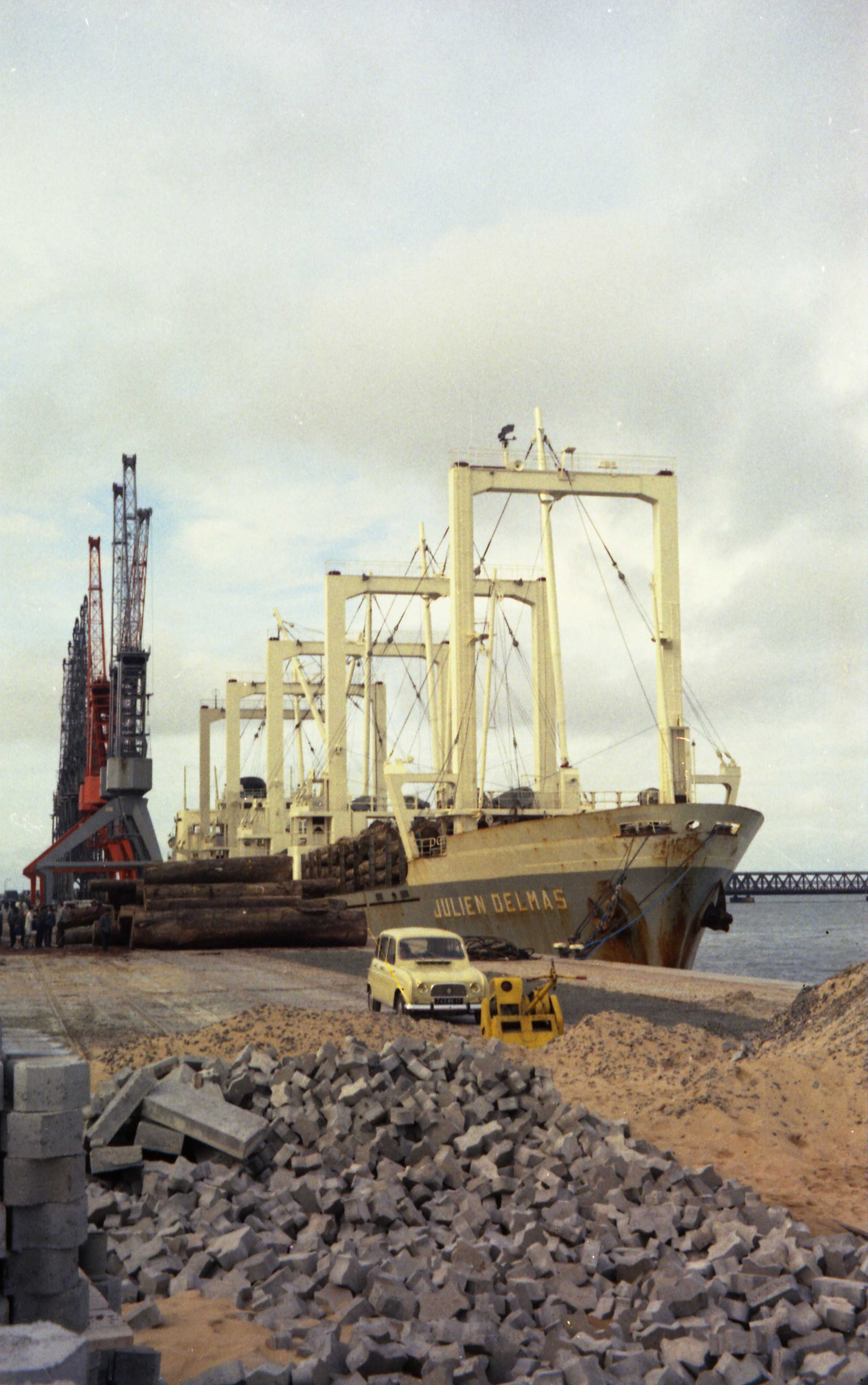 Un navire grumier "Le Julien Delmas" (équipé de grands mâts portiques) en train d'être vidé de son chargement de grumes au môle d'escale du port de commerce de La Rochelle-Pallice. IMO 5263944 1969.